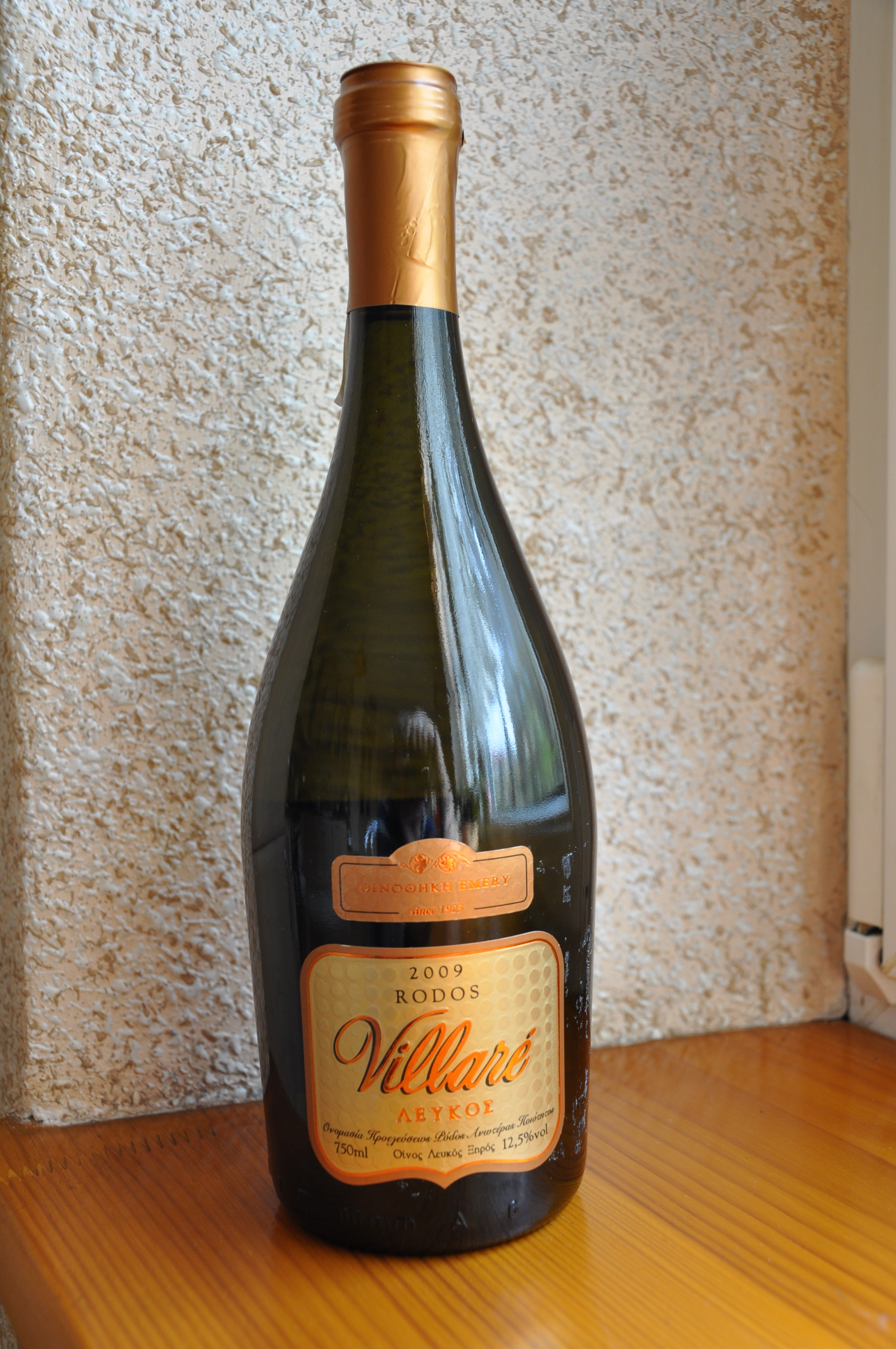 Attaviros in Rhodes. White Wine. alk.12,5%. 750ml